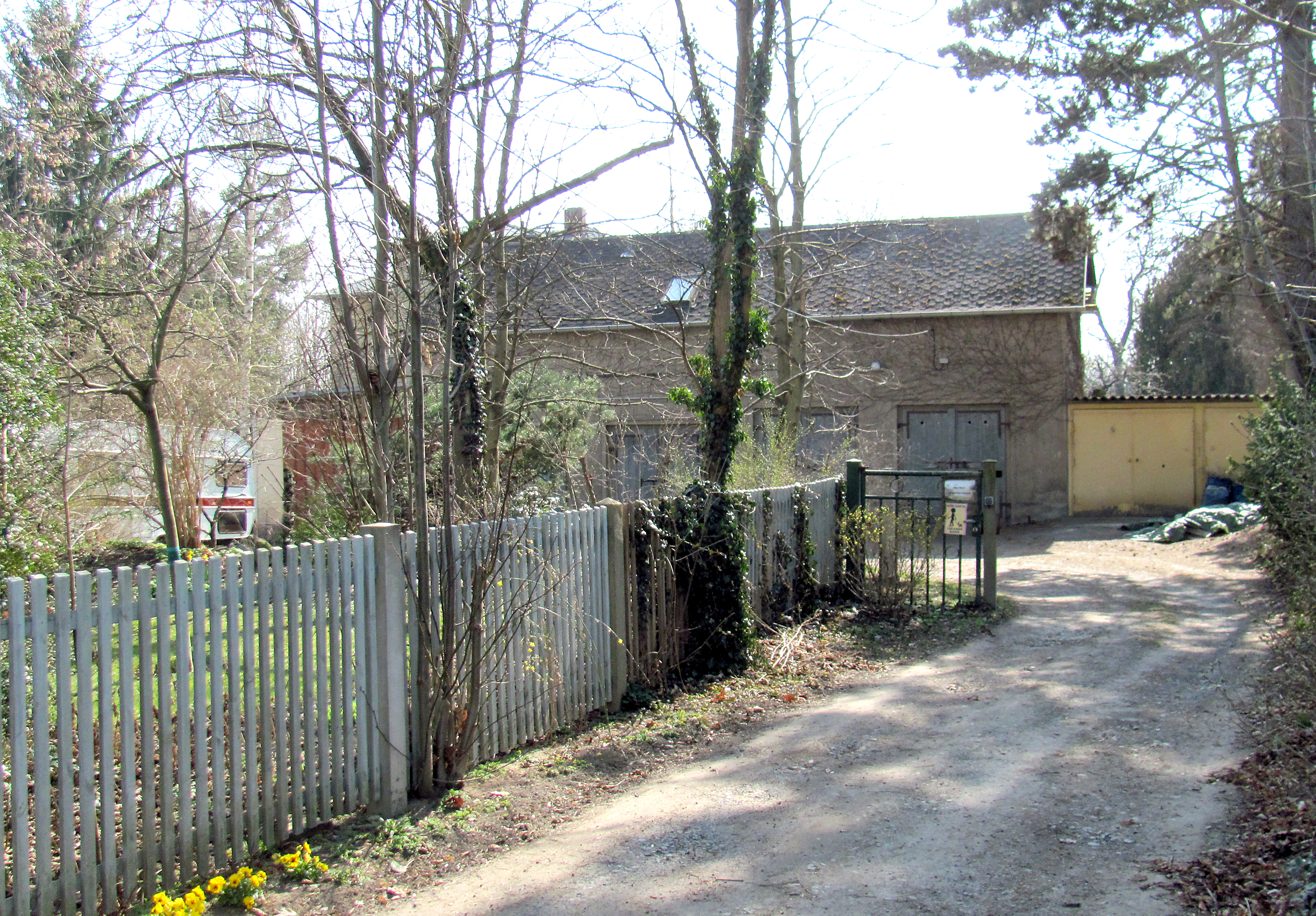 Radebeul-Niederlößnitz, Villa Borstraße 7 (Radebeul), Remisengebäude